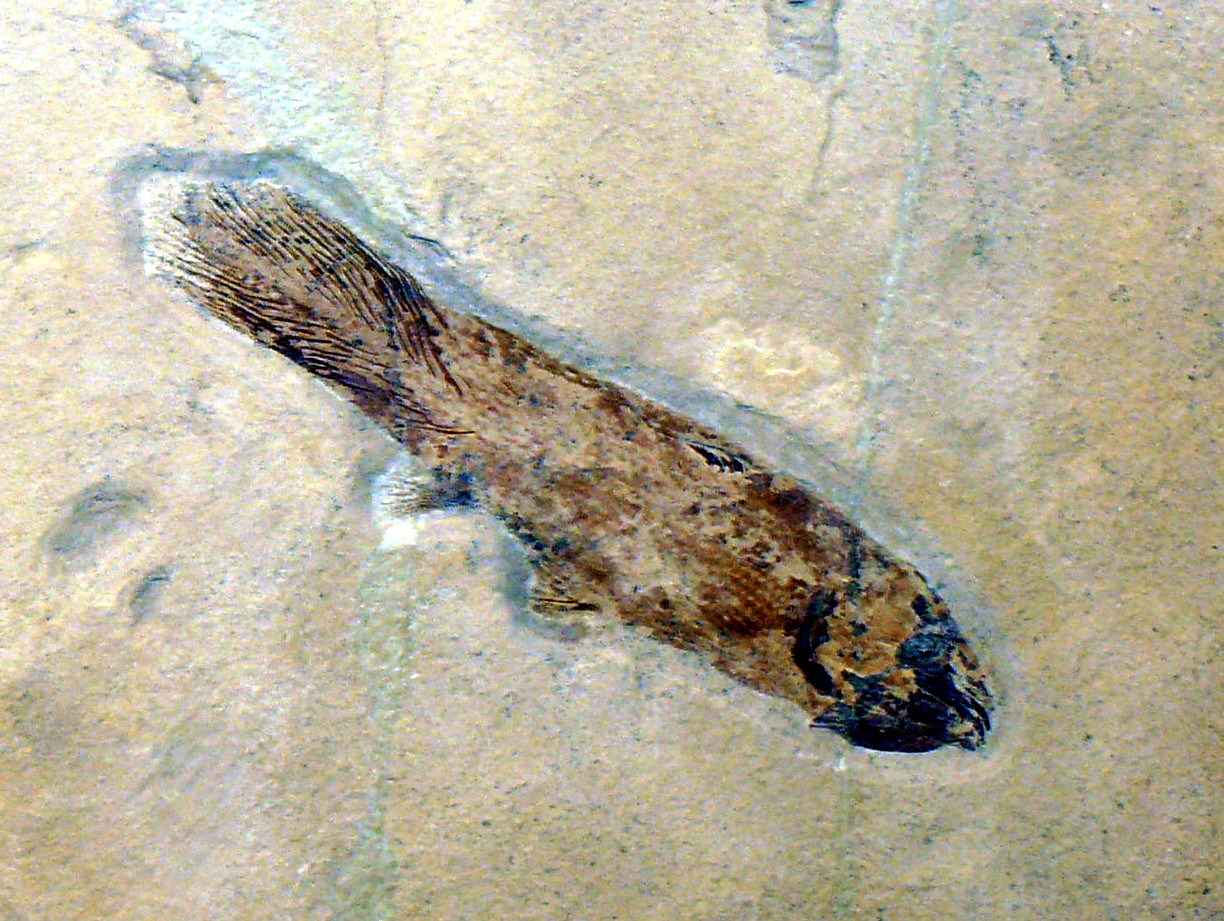 Caridosuctor populosum aus dem Oberkarbon (vor etwa 300 Mill. Jahren) von Fergus County, Montana, USA.